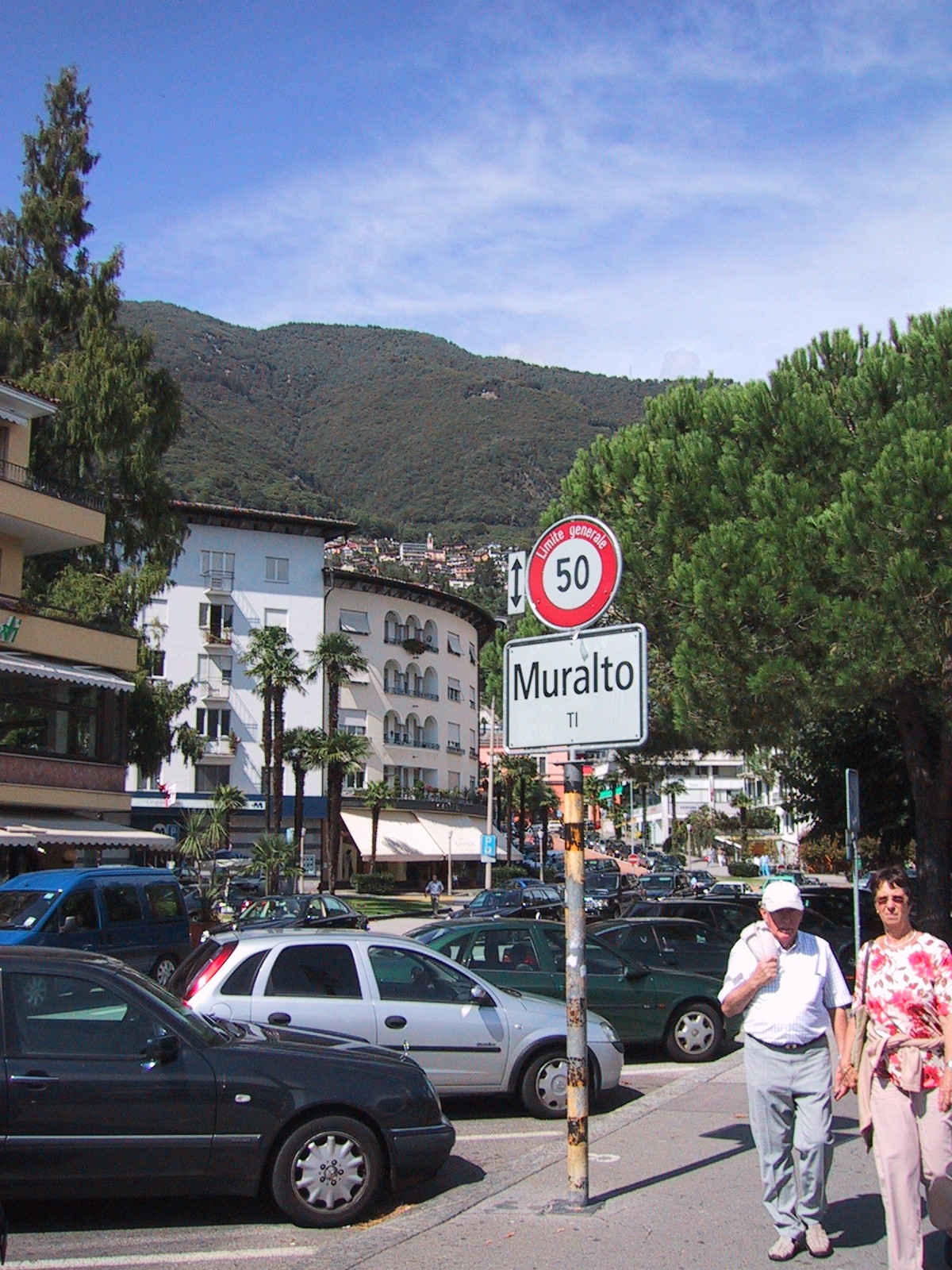 Muralto an der Grenze zur Stadt Locarno, Kanton Tessin